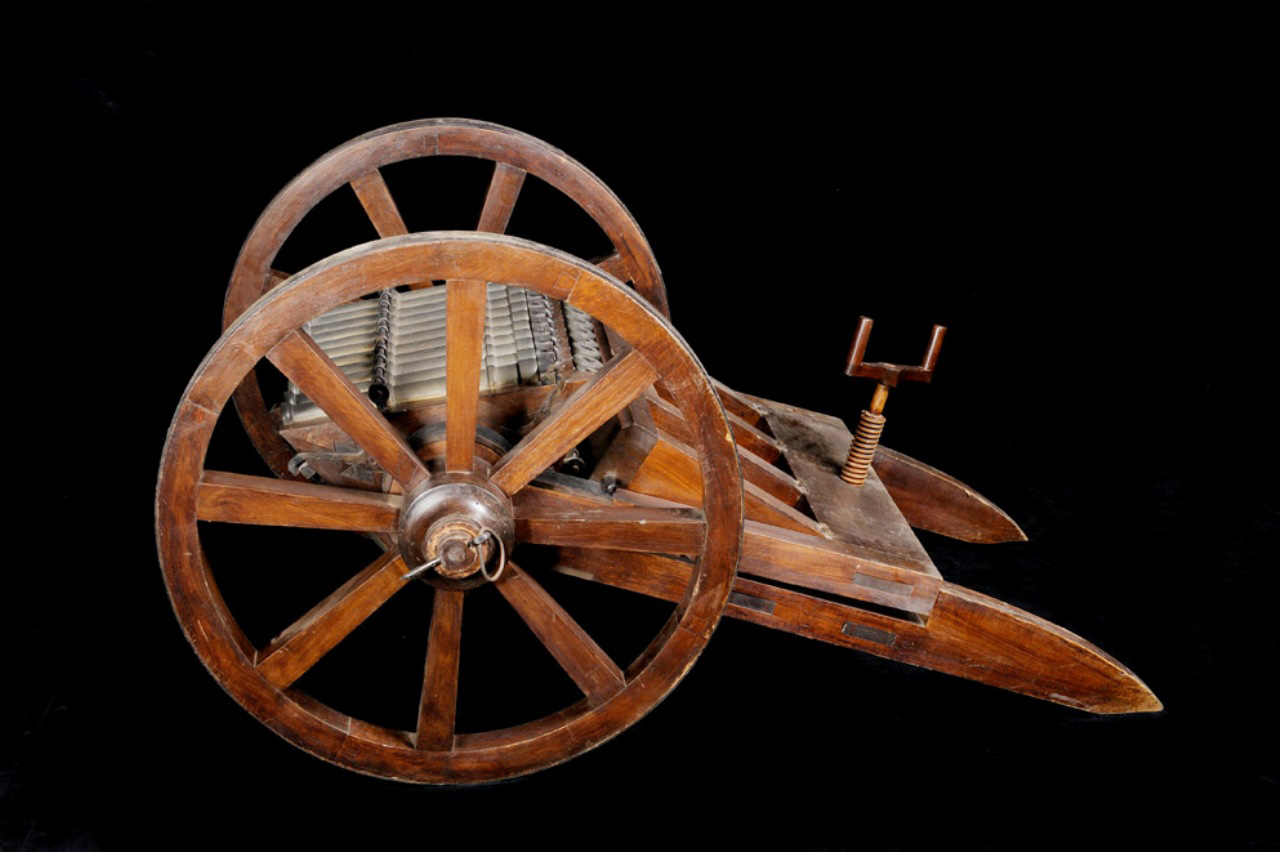 Questo modello rappresenta una batteria di cannoni costituita da 33 piccole bocche da fuoco ordinate in tre file da 11 ciascuna su unico telaio rotante. Le bocche da fuoco ad avancarica sono fissate al telaio con una cerniera che ne permette la rotazione verso l'alto per il caricamento. Una vite senza fine è inserita nell'affusto Funzione Il cannone multiplo ad avancarica e bocca da fuoco in bronzo, era destinata ad affiancare le azioni della fanteria. Modalità d'uso Scaricata la prima fila, l'artigliere avrebbe potuto successivamente mettere in posizione di fuoco la seconda e la terza. Una volta caricate, le canne sono trattenute in posizione da un'asta di metallo fissata ai lati mediante cavicchi. La vite senza fine permetteva di variare l'alzo del tiro.